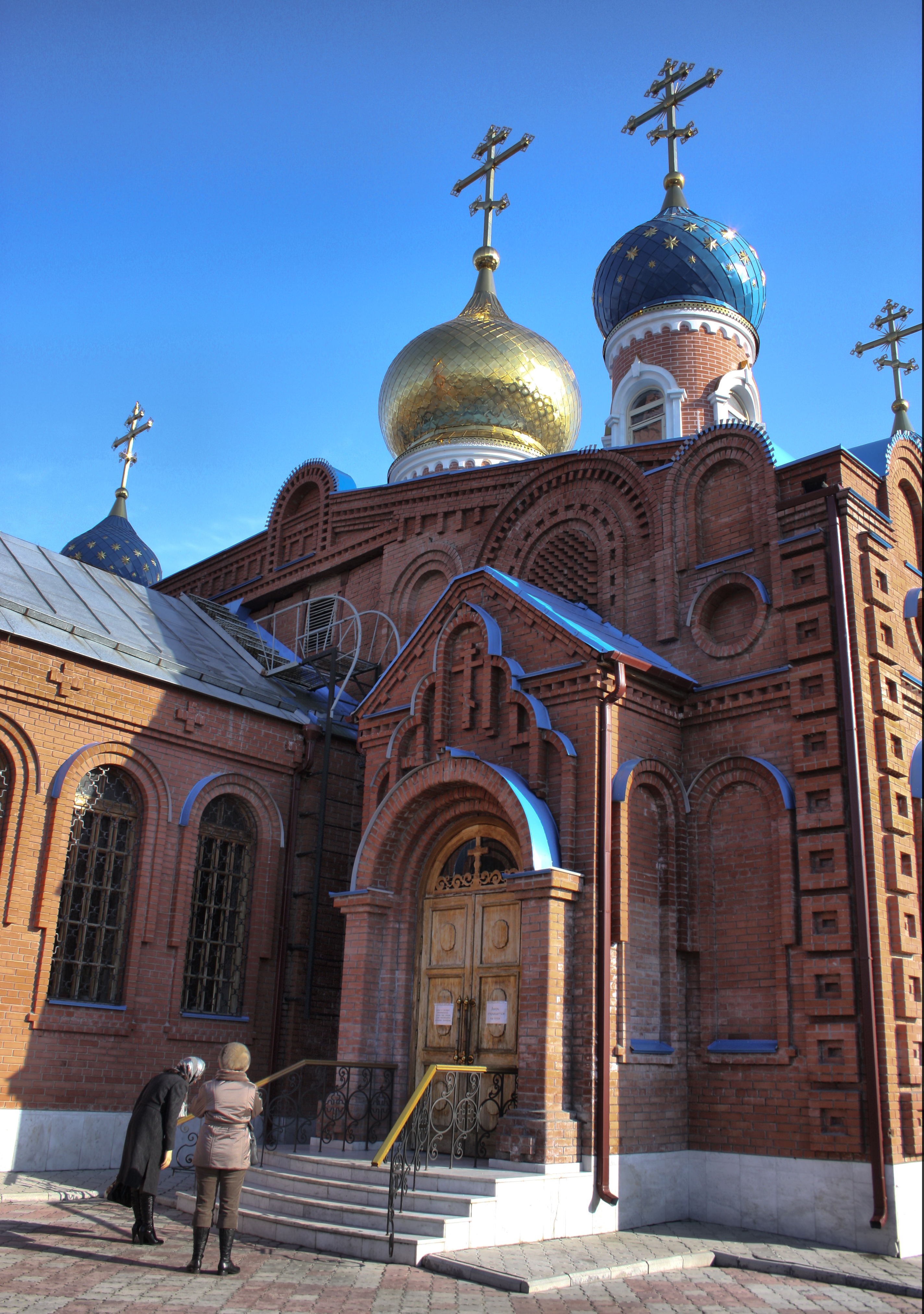 Самара, Свято-воскресенский собор